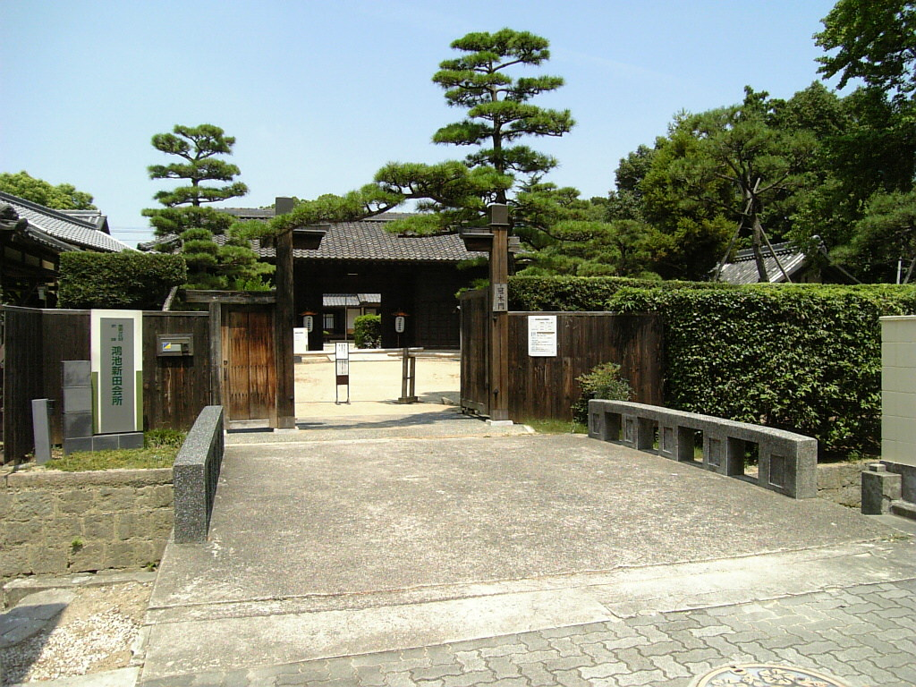 鴻池新田会所（大阪府東大阪市）